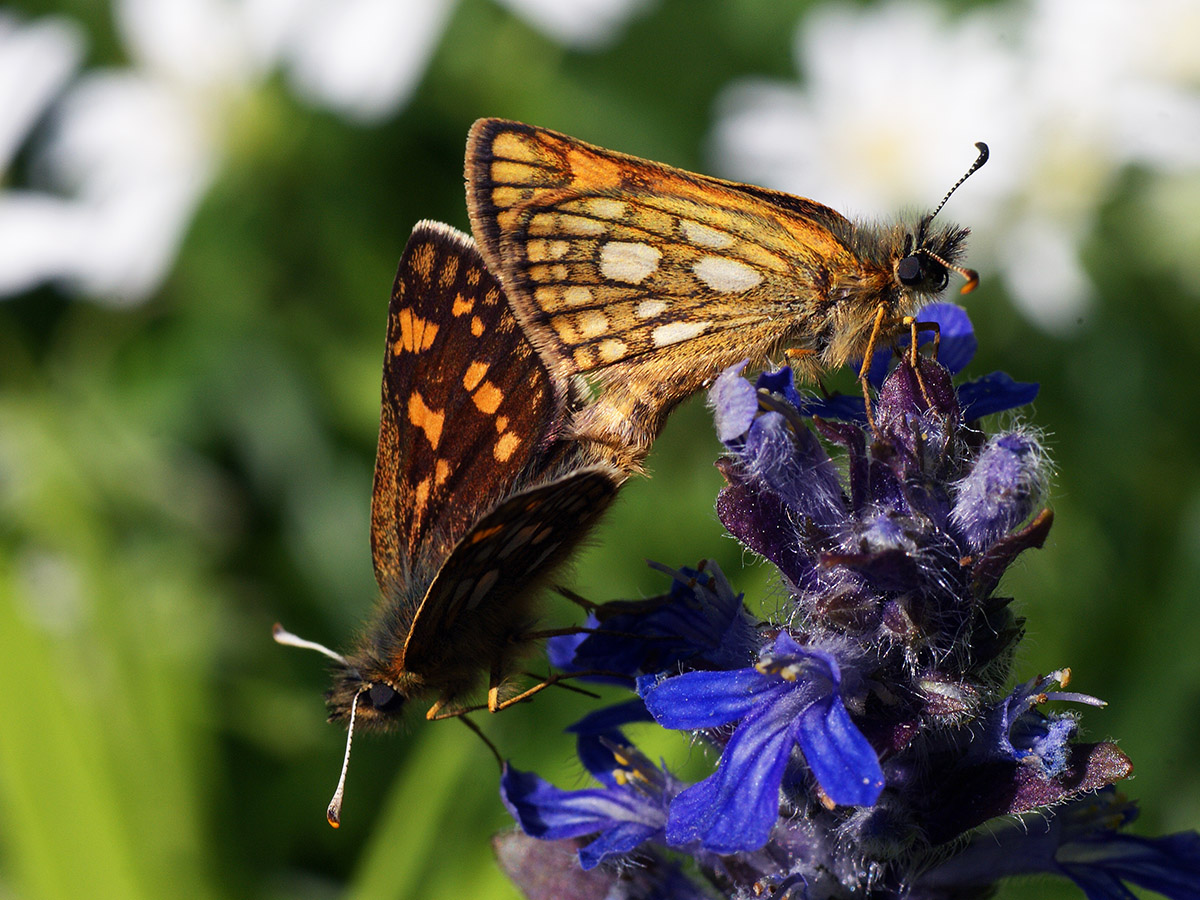 Exemplar found: Russia, Moscow Oblast, Odintsovsky District, near village Pestovo, 11.06.2017, on blue bugle (Ajuga reptans) flowers, days МО, Одинцовский р-н, окрестности деревни Пестово, 11.06.2017, на цветках живучки, днём